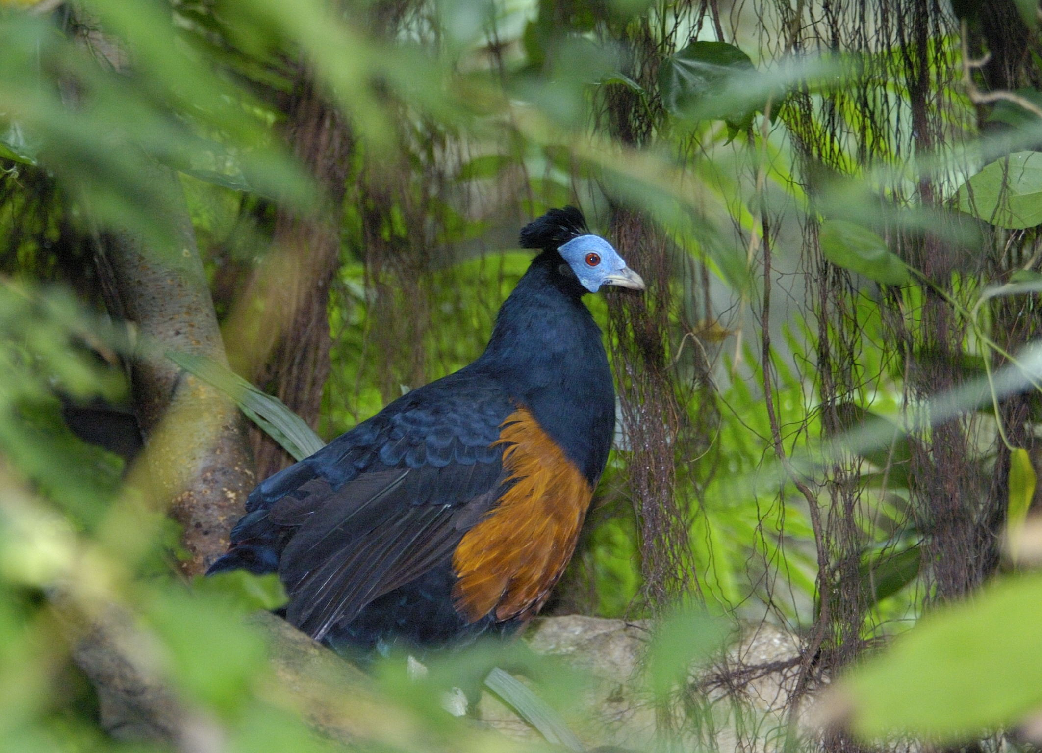 Feuerrückenfasan (Lophura ignita nobilis) im Tiergarten Schönbrunn, Wien, Österreich